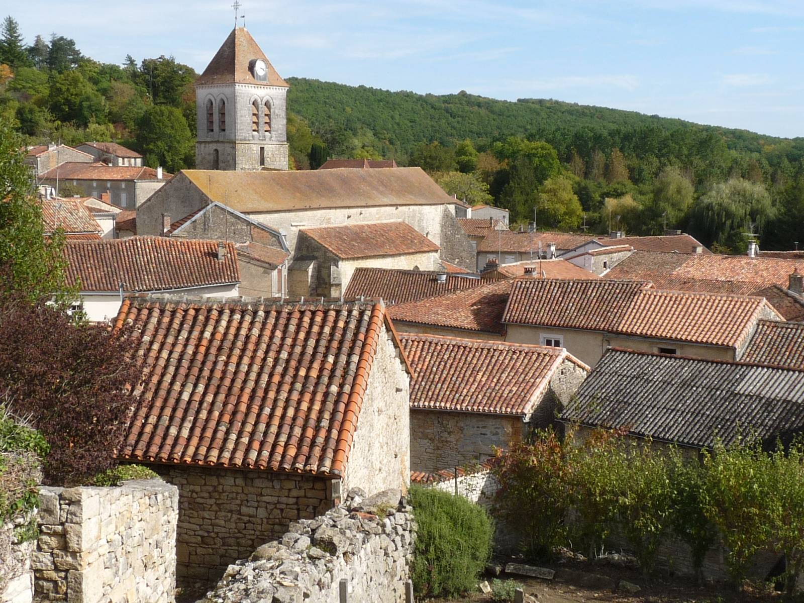 vue sur Nanteuil-en-Vallée, Charente, France